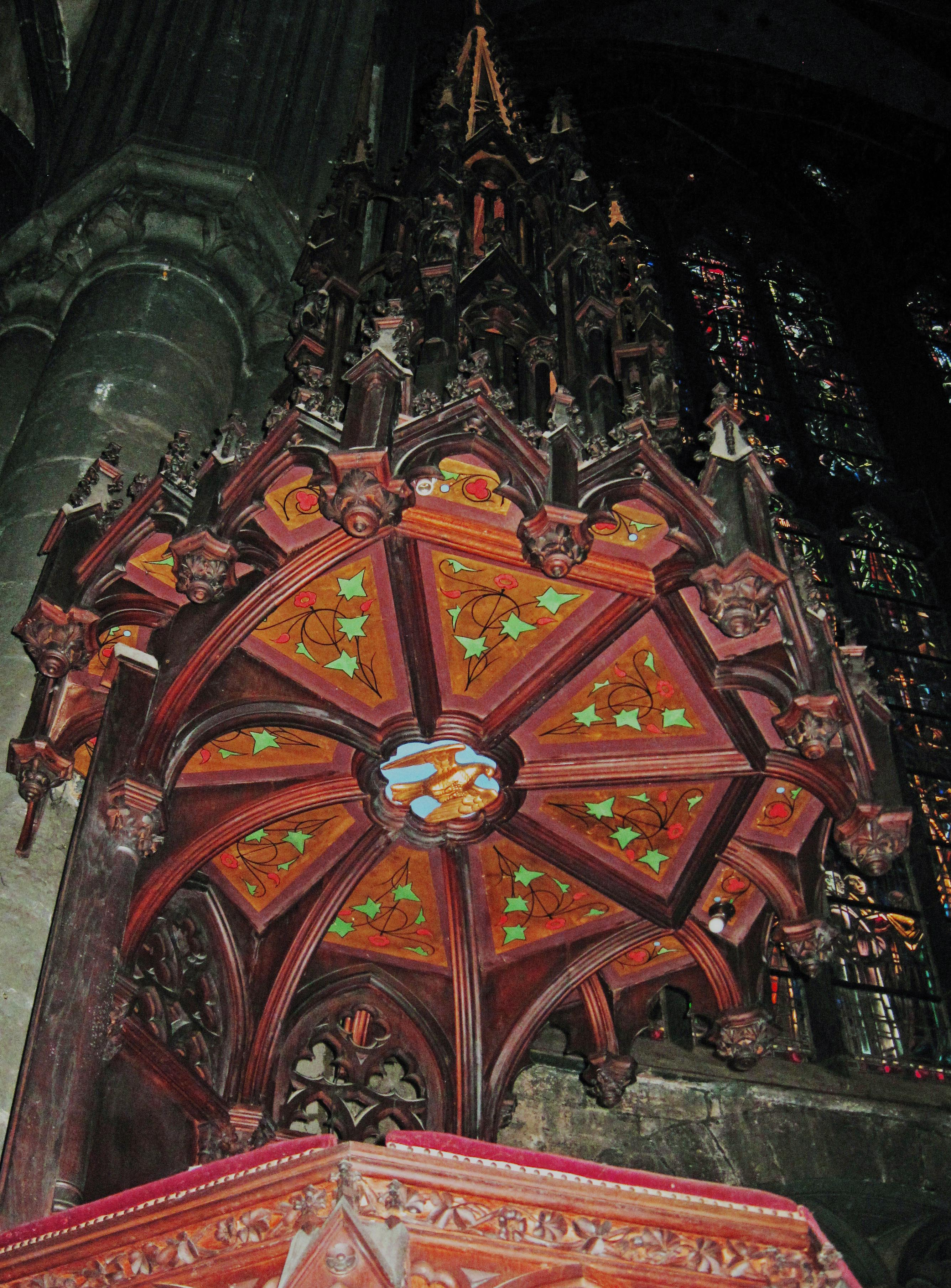 Détail du toit de la Chaire de Vérité à la Collégiale de Huy